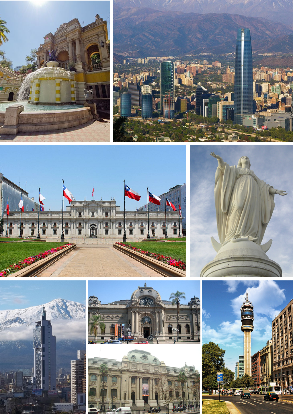 Imágenes de la ciudad de Santiago de Chile. Trabajo derivado de: La Moneda Catedral Santiago Chile Torre Telefónica en Providencia m. bellas artes Inmaculadacerro Santiago chile 2013 Biblioteca Nacional Chile.jpg TorreEntel.JPG Cerro Santa Lucía-003